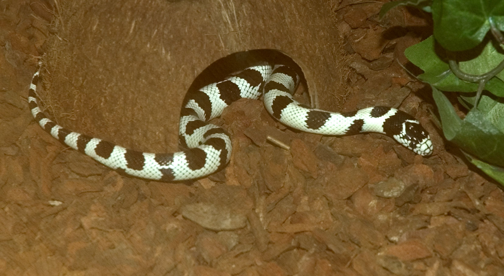 California King snake.Snake